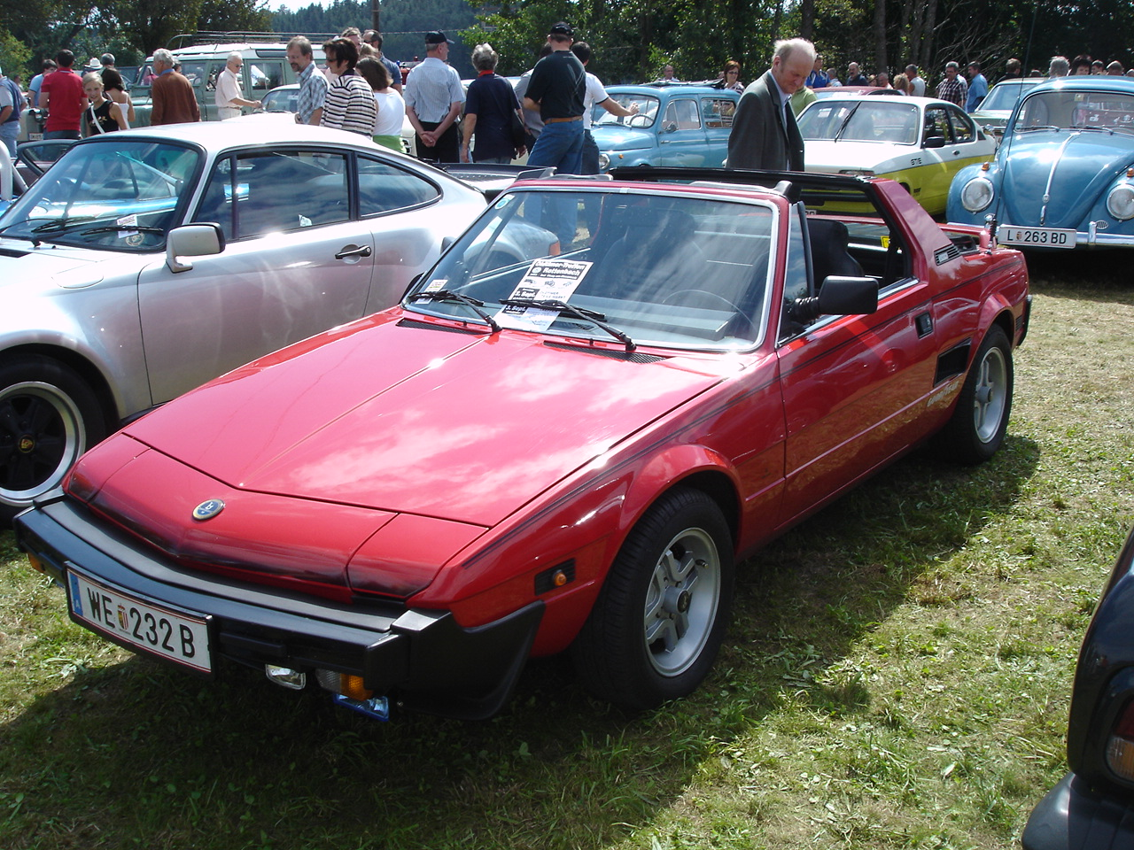 Bertone Spider